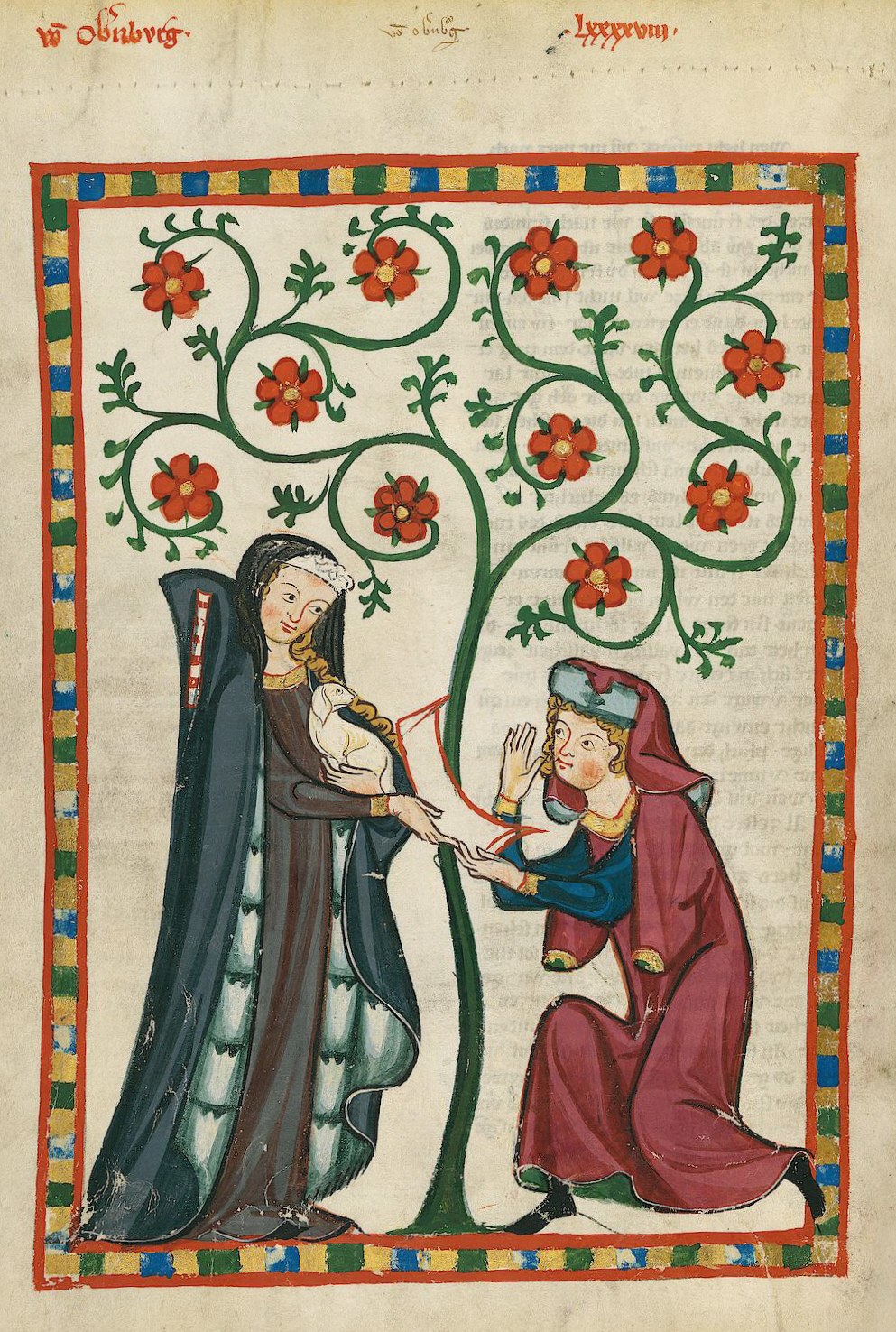 Codex Manesse, UB Heidelberg, Cod. Pal. germ. 848, fol. 342v, von Obernburg